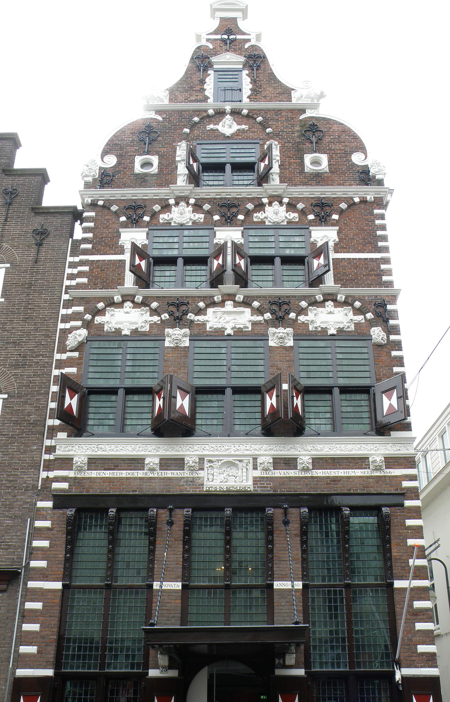 Gorinchem (prov. Zuid-Holland, Nederland). Pand Dit is in Bethlehem, Gasthuisstraat 25 (Rijksmonument).